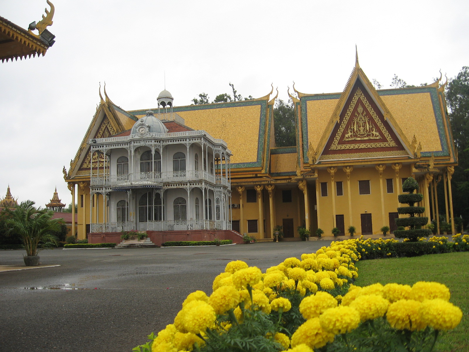 Điện Napoleong trong Hoàng Cung Campuchia - ảnh chụp tại Hoàng Cung Campuchia . Phan Minh Châu - tài khoản liftold trên wiki